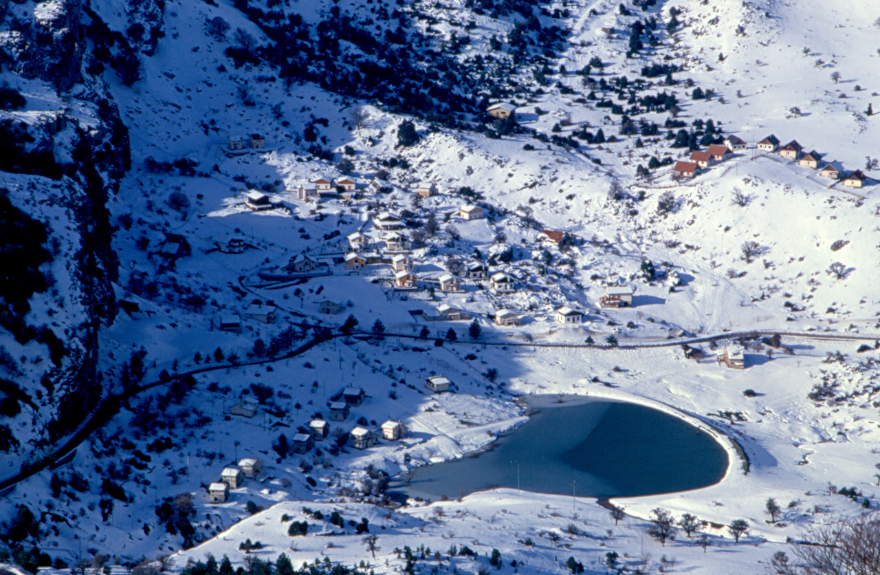 Piano Zucchi, Vista da Pizzo Carbonara.